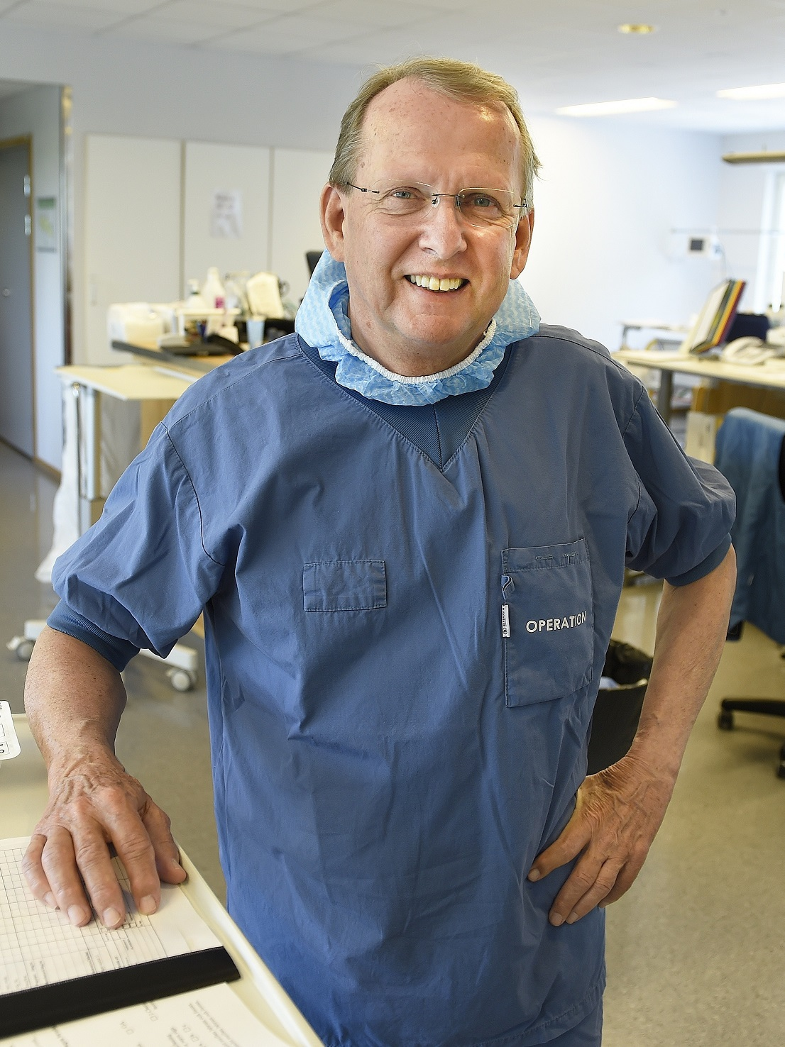 Idrottsläkaren och docenten Leif Swärd.